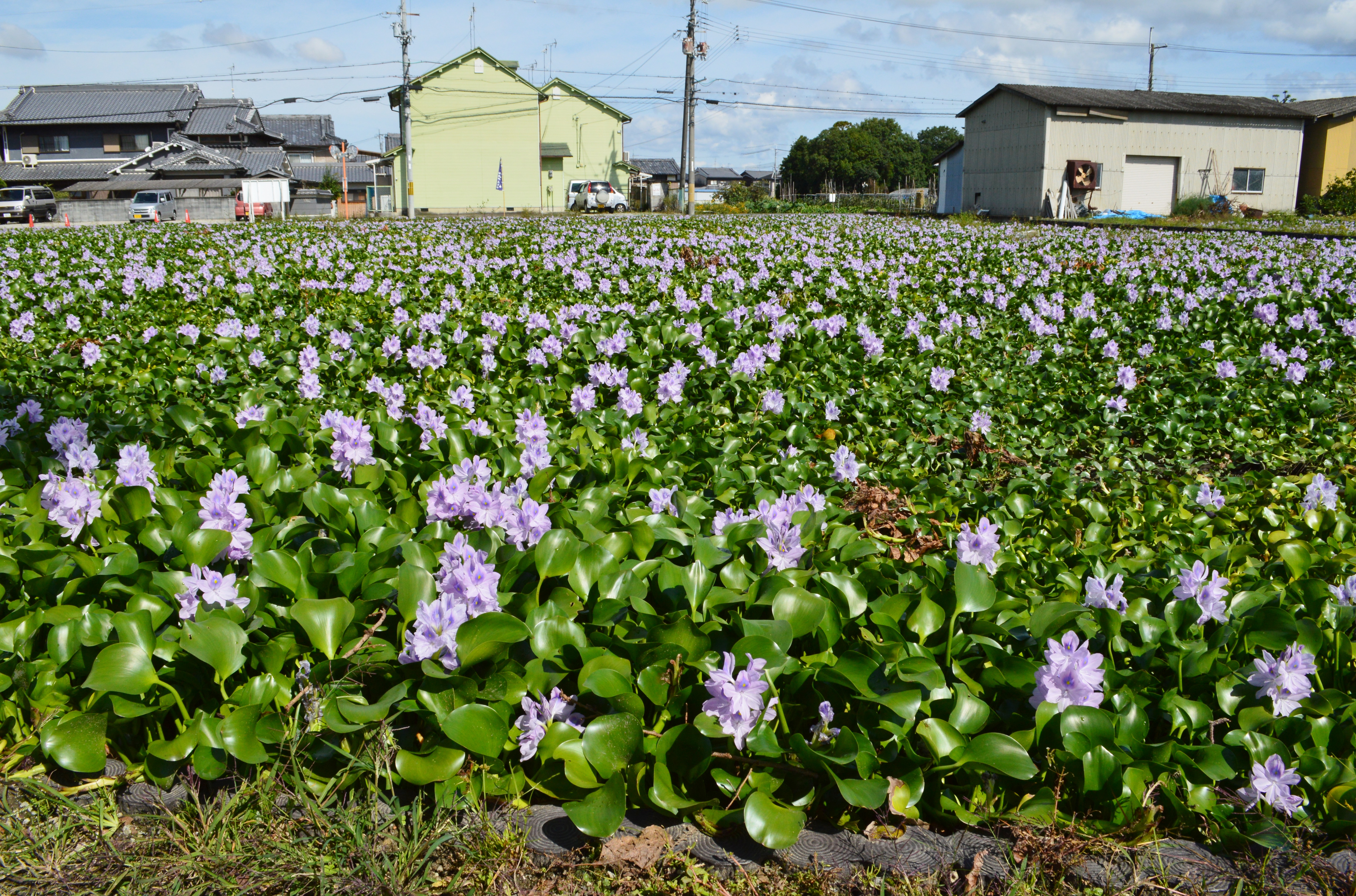 本薬師寺跡付近のホテイアオイ